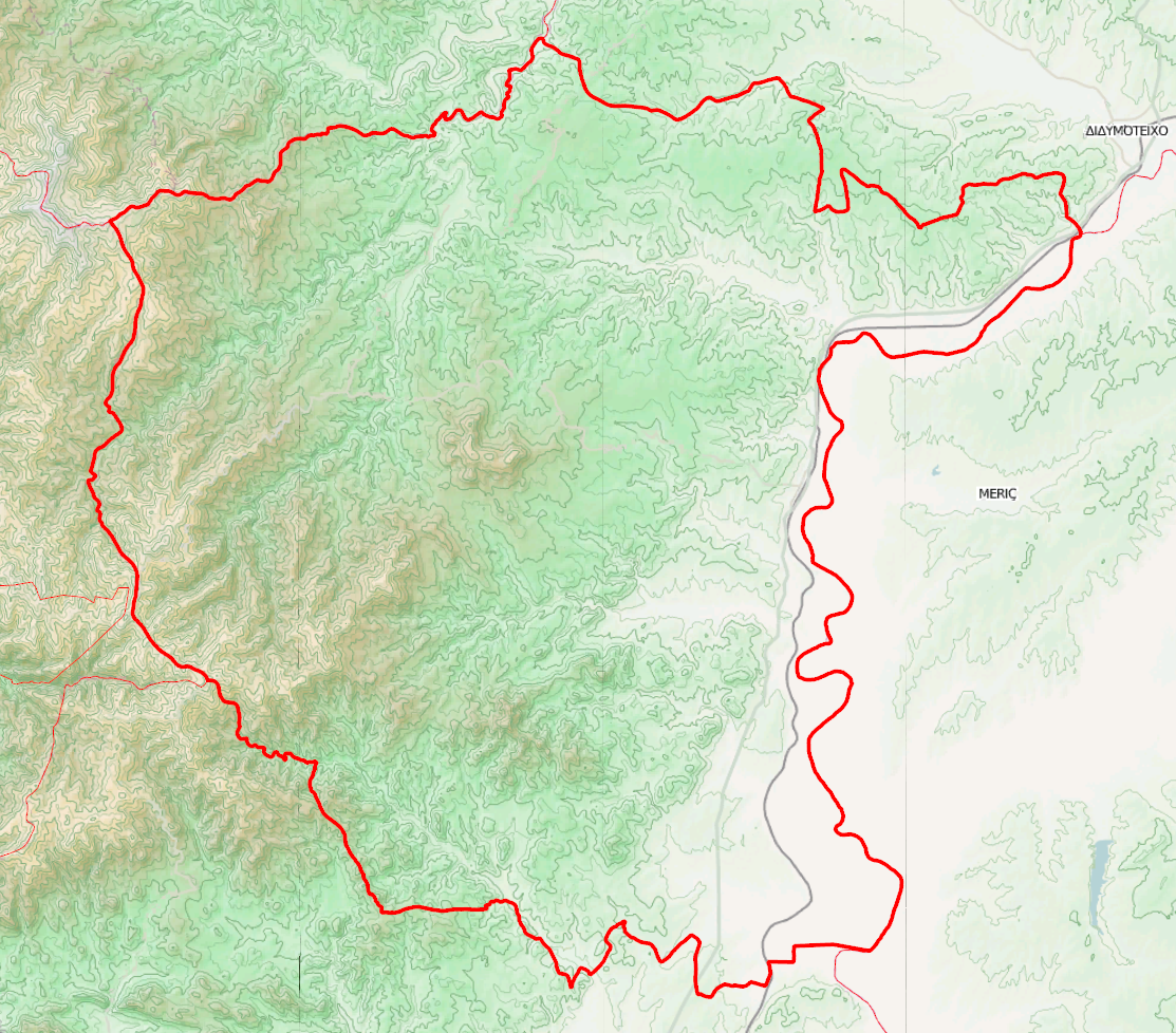 Τοπογραφικός χάρτης του Δήμου Σουφλίου.